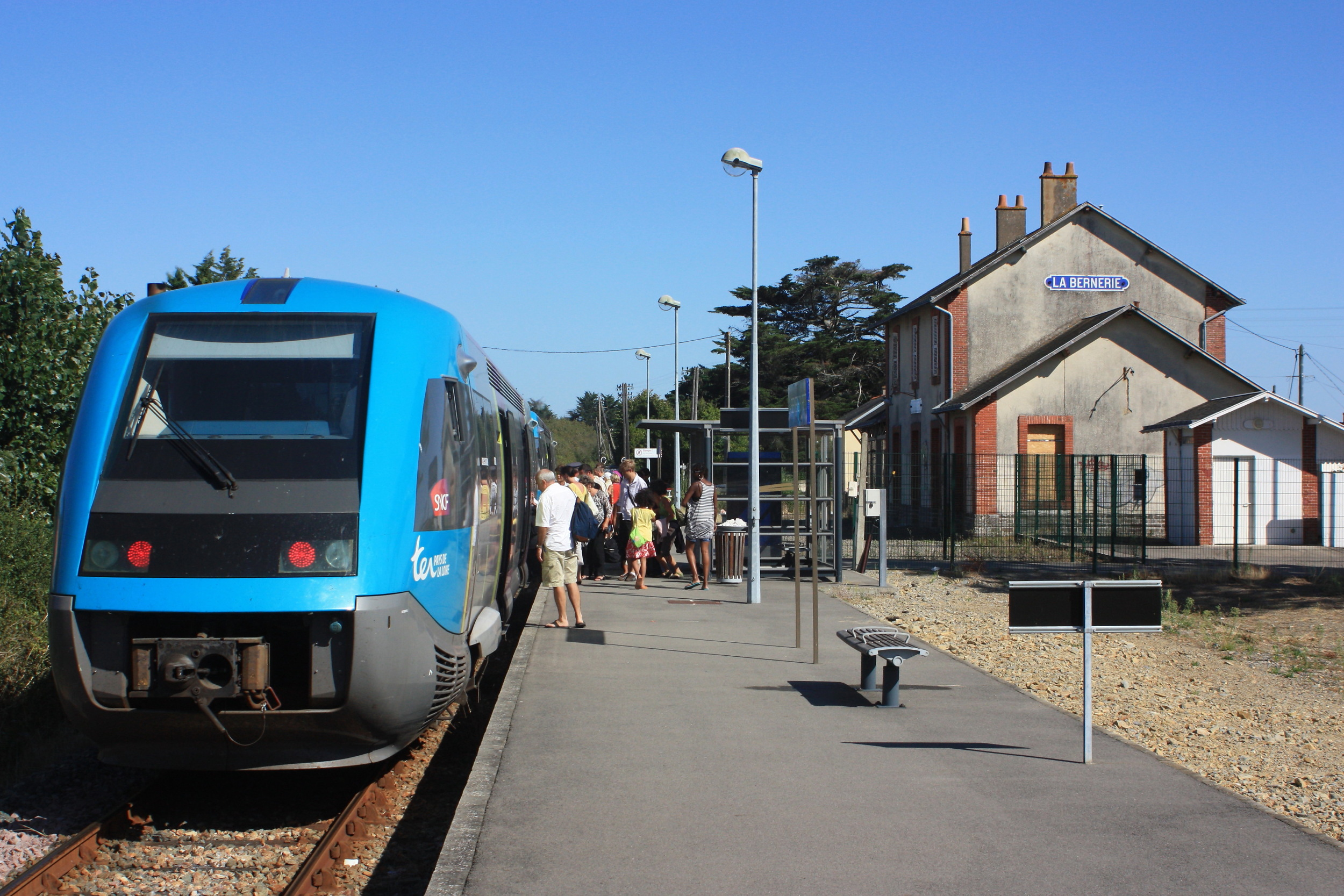 Deux ATER (X 73500) sur le TER59264 à destination de Nantes desservent la gare de la Bernerie